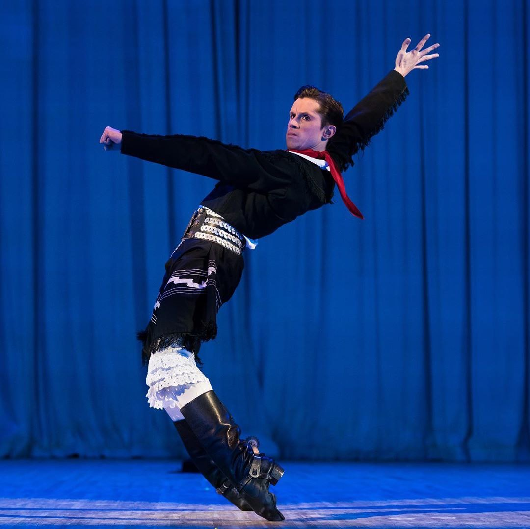 Александр Тихонов. Российский танцовщик